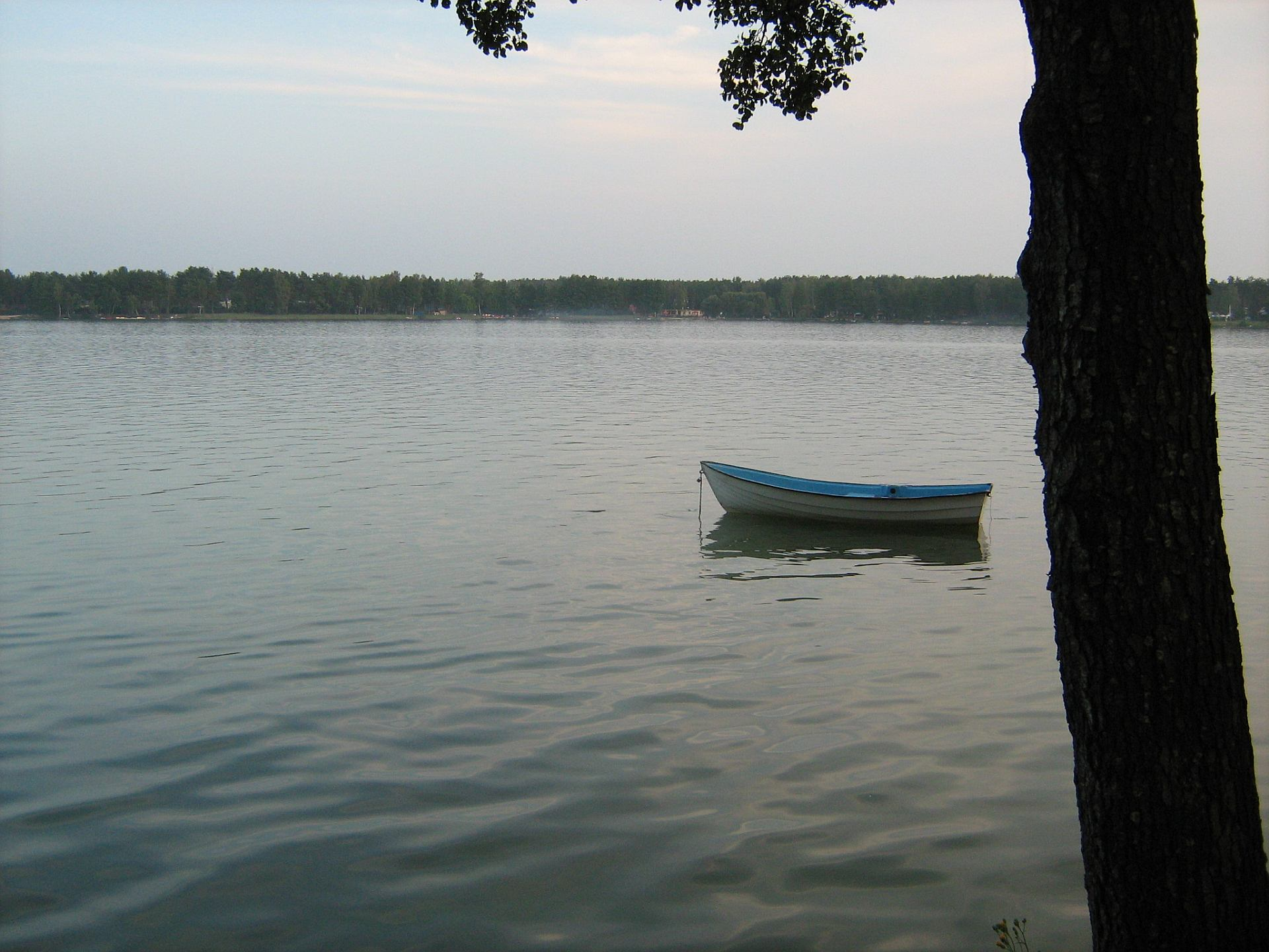 Jezioro Białe niedaleko Włodawy.